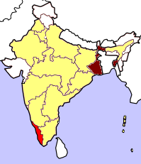 Lok Sabha 1998. Gjord av Soman.